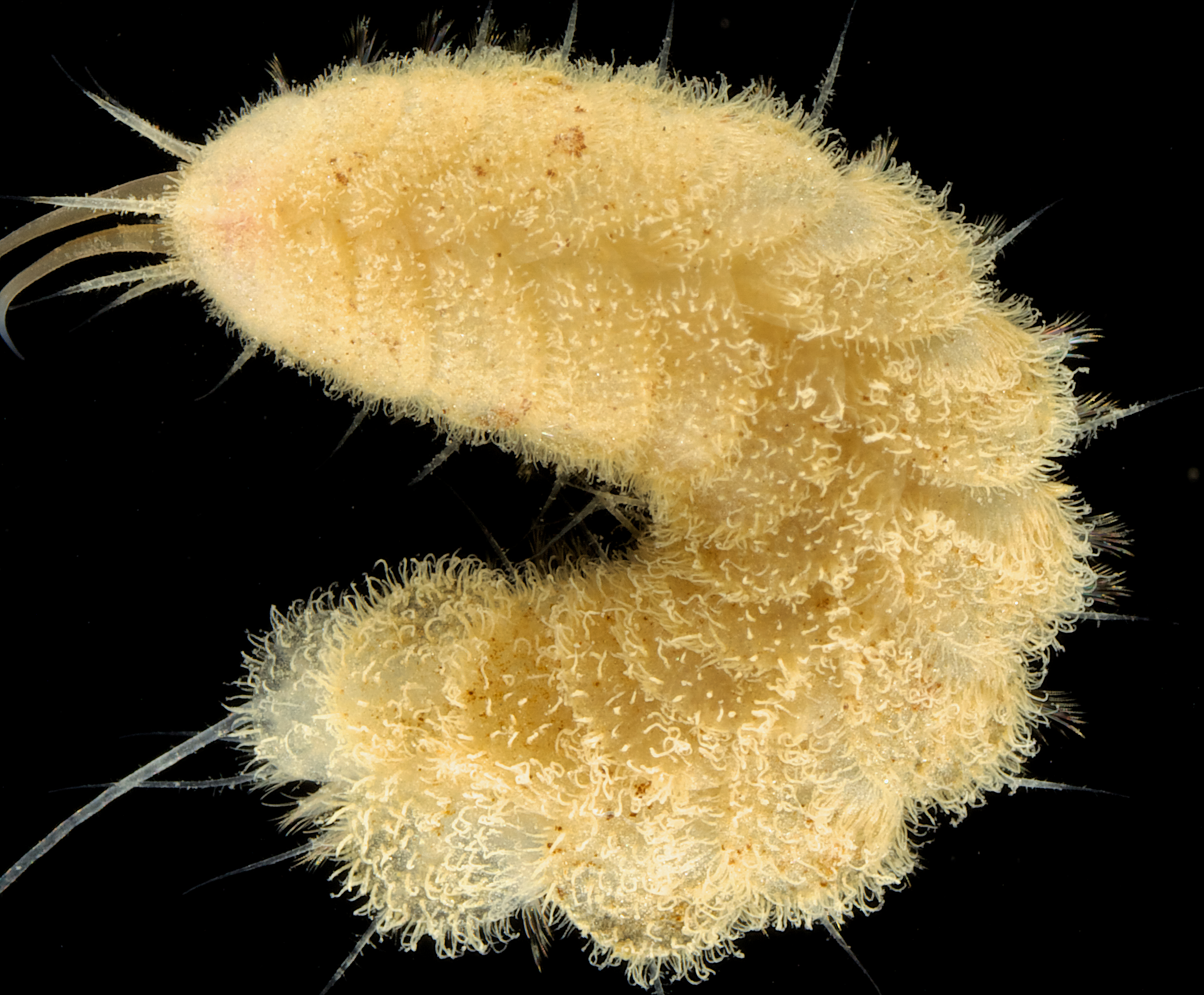 Eucranta villosa